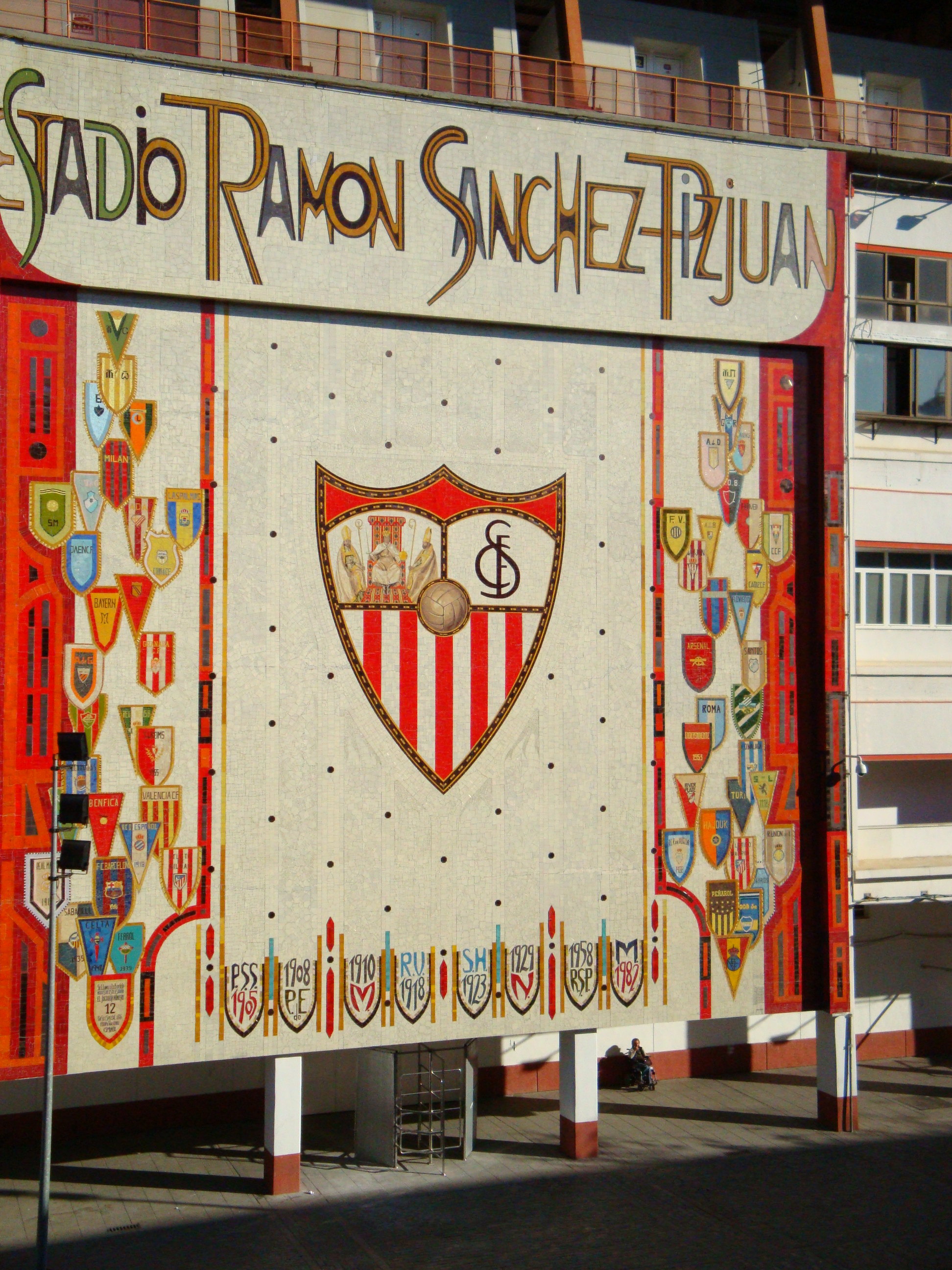 Mosaico conmemorativo en la fachada principal del Ramón Sánchez Pizjoan (Sevilla)